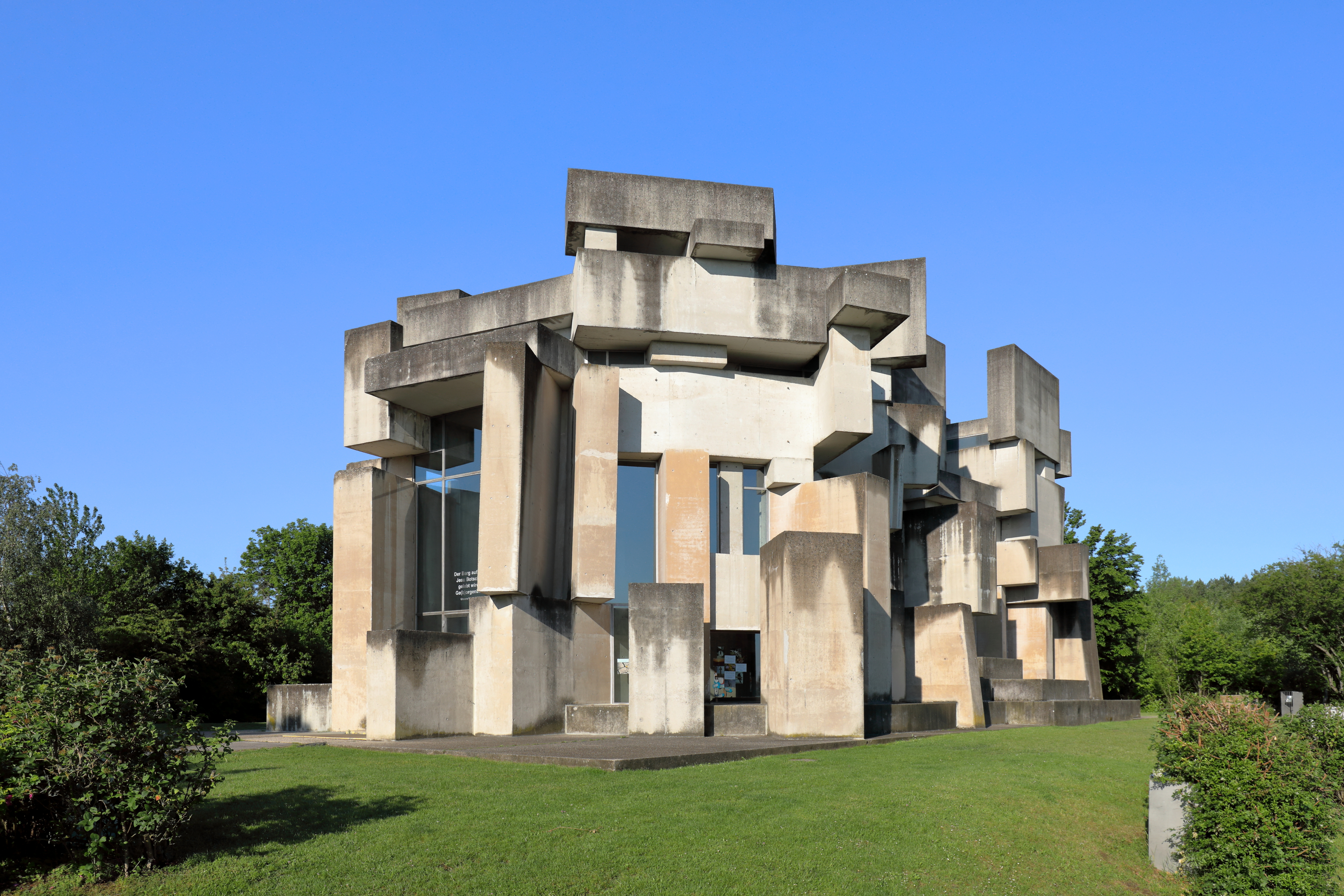 Nordostansicht der Wotruba- bzw. Dreifaltigkeitskirche auf dem Georgenberg im Wiener Stadtteil Mauer des 23. Gemeindebezirkes Liesing.Die Kirche im Stil des Brutalismus wurde auf Initiative von Margarethe Ottillinger (1919–1992) und nach einer Idee des Künstlers Fritz Wotruba (1907–1975) vom Architekten Fritz Gerhard Mayr (* 1931) errichtet. Der Entwurf für die Kirche (152 Betonblöcke mit einen Gesamtgewicht von über 4000 Tonnen, ohne Symmetrie aufeinander geschachtelt, mit schmalen, verschieden hohen Fensteröffnungen) wurde von Wotruba 1964 präsentiert. Wegen großem Widerstand konnte man erst 1974 mit dem Bau beginnen und zwei Jahre später, am 24. Oktober 1976, erfolgte die feierliche Einweihung durch Kardinal Franz König.